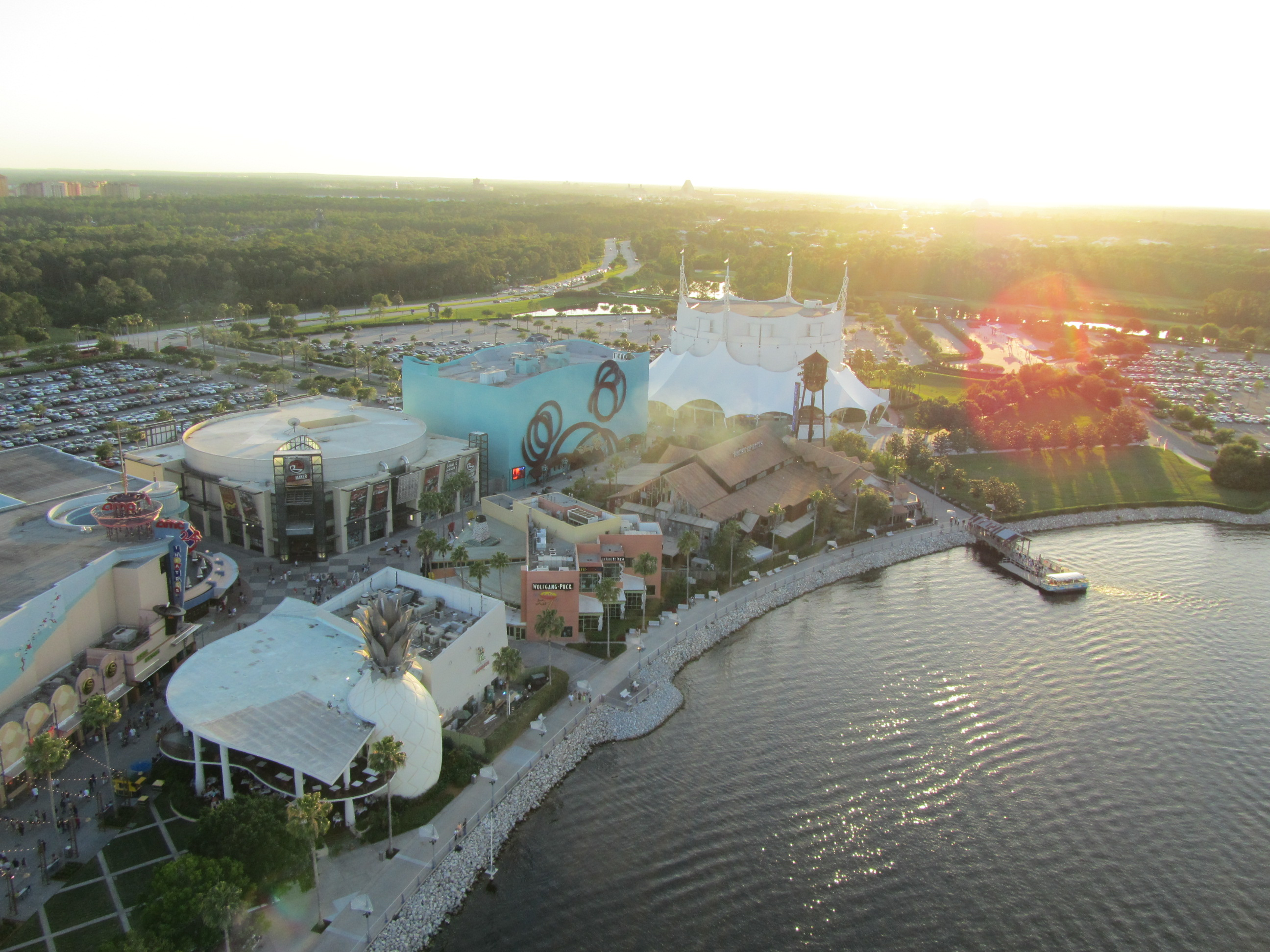 Orlando, Florida